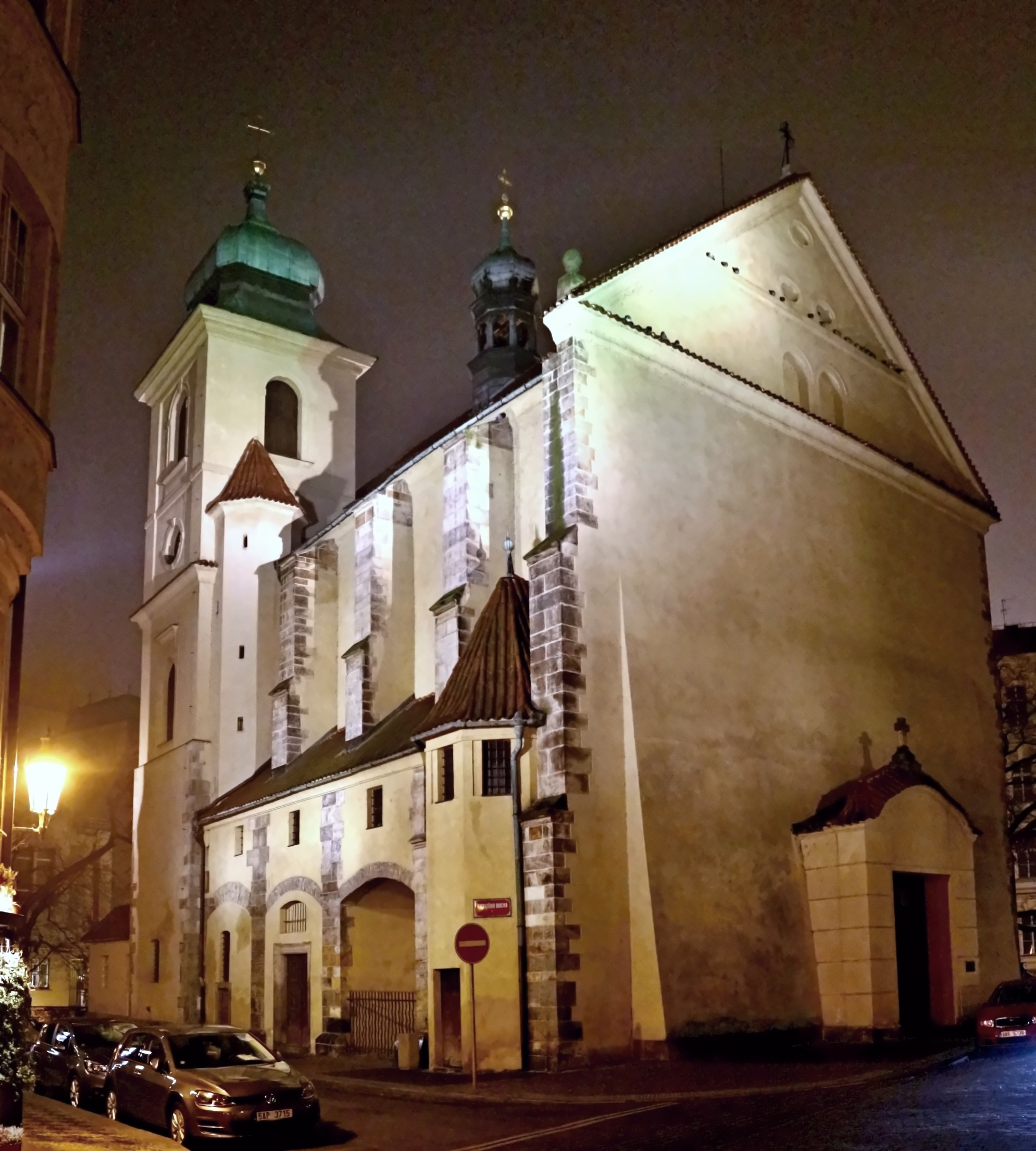 Staré Město, kostel sv. Ducha